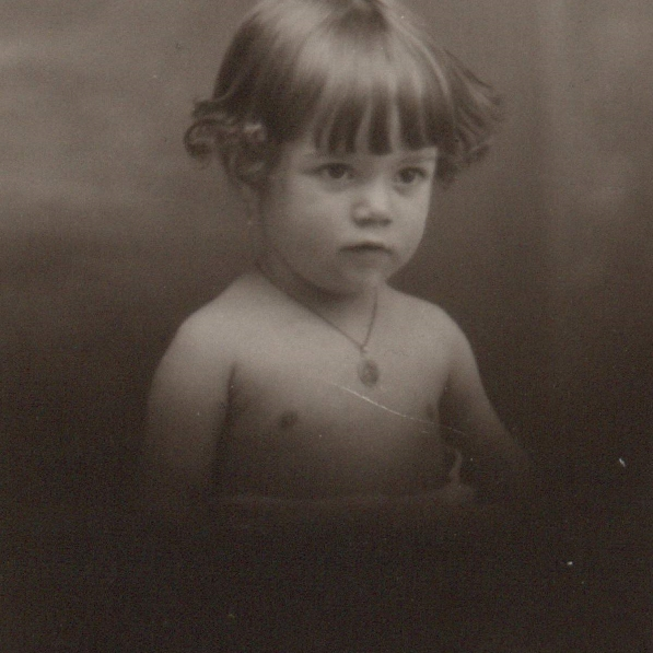 Carmen Martínez Gaite